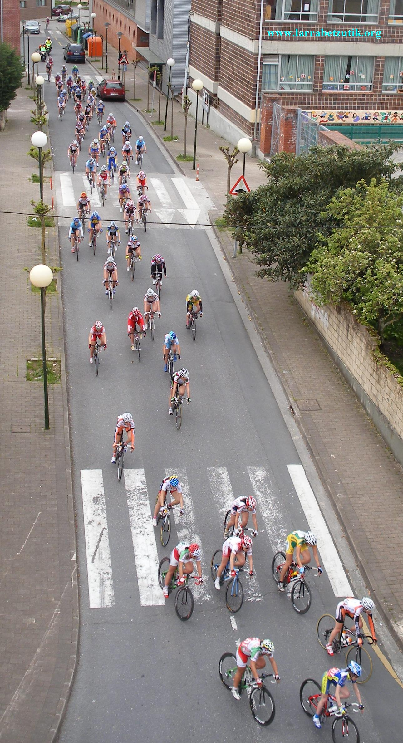 emakumeen bira txorierrin